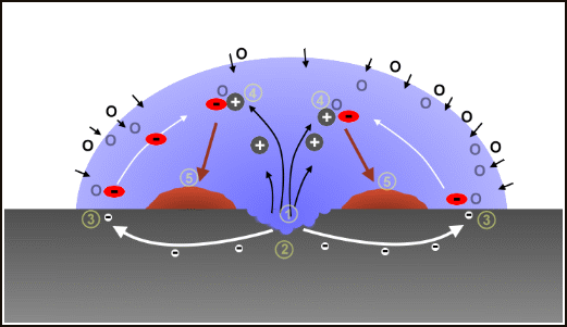 Modell des Rostens von Eisen in Gegenwart von Wasser und Sauerstoff Zeichner: Anton (rp) 2004 Nutzungsrechte freigegeben: GNU Free Documentation License.